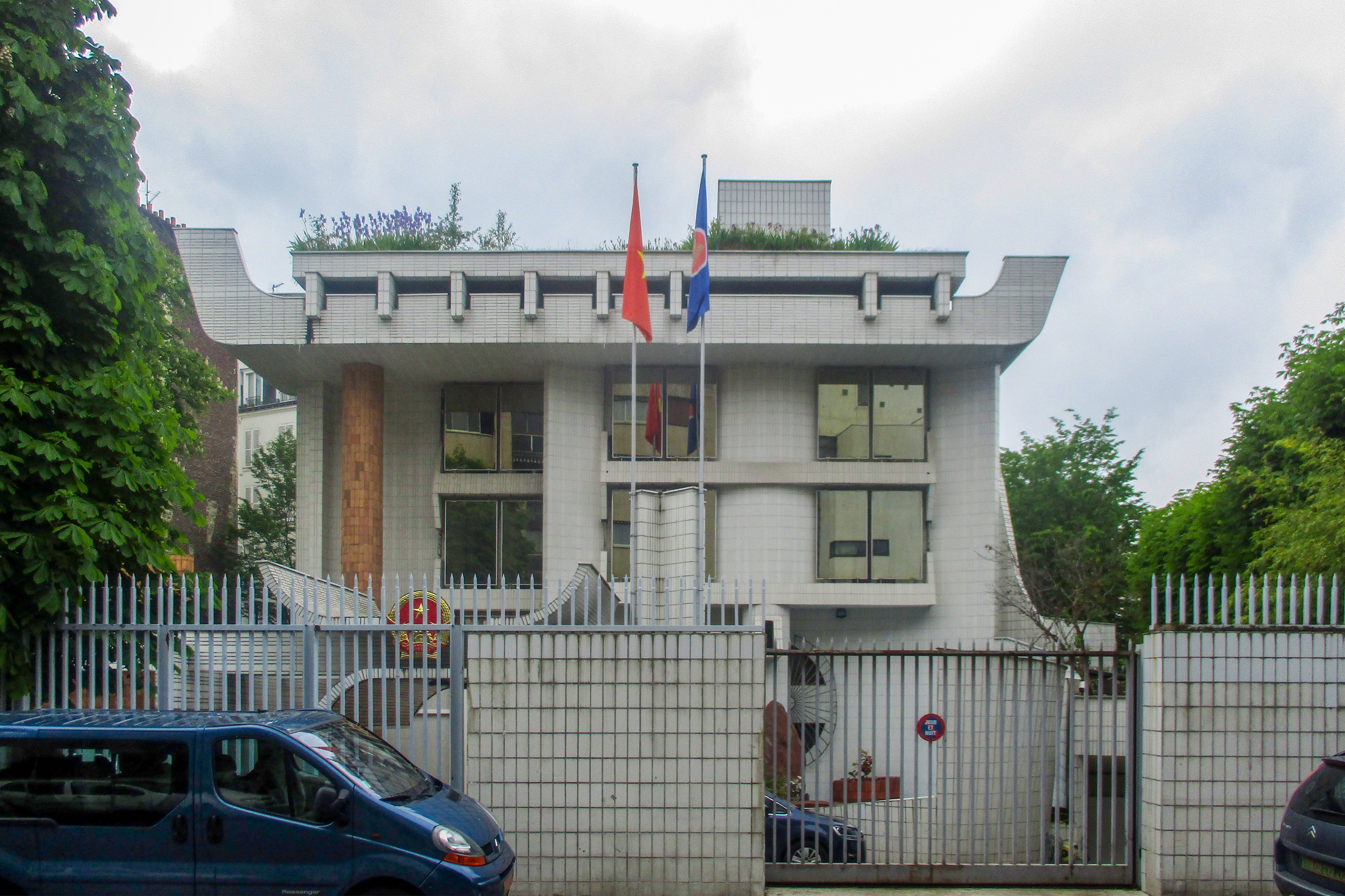 Ambassade du Vietnam, Paris XVIe.